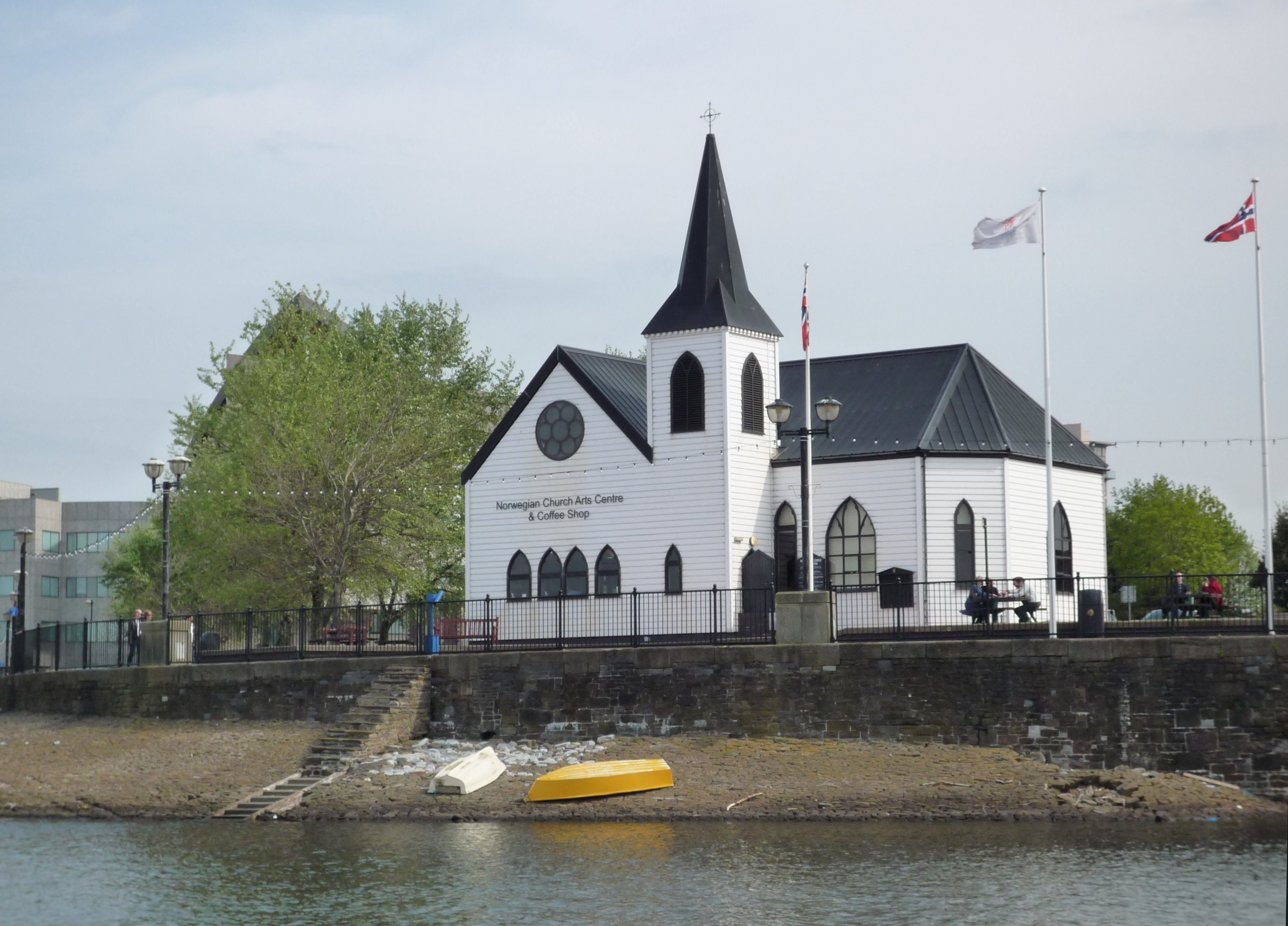 Norwegian Church Cardiff Bay